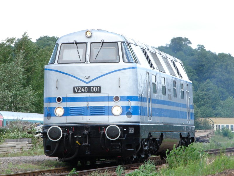 V 240 in Nossen